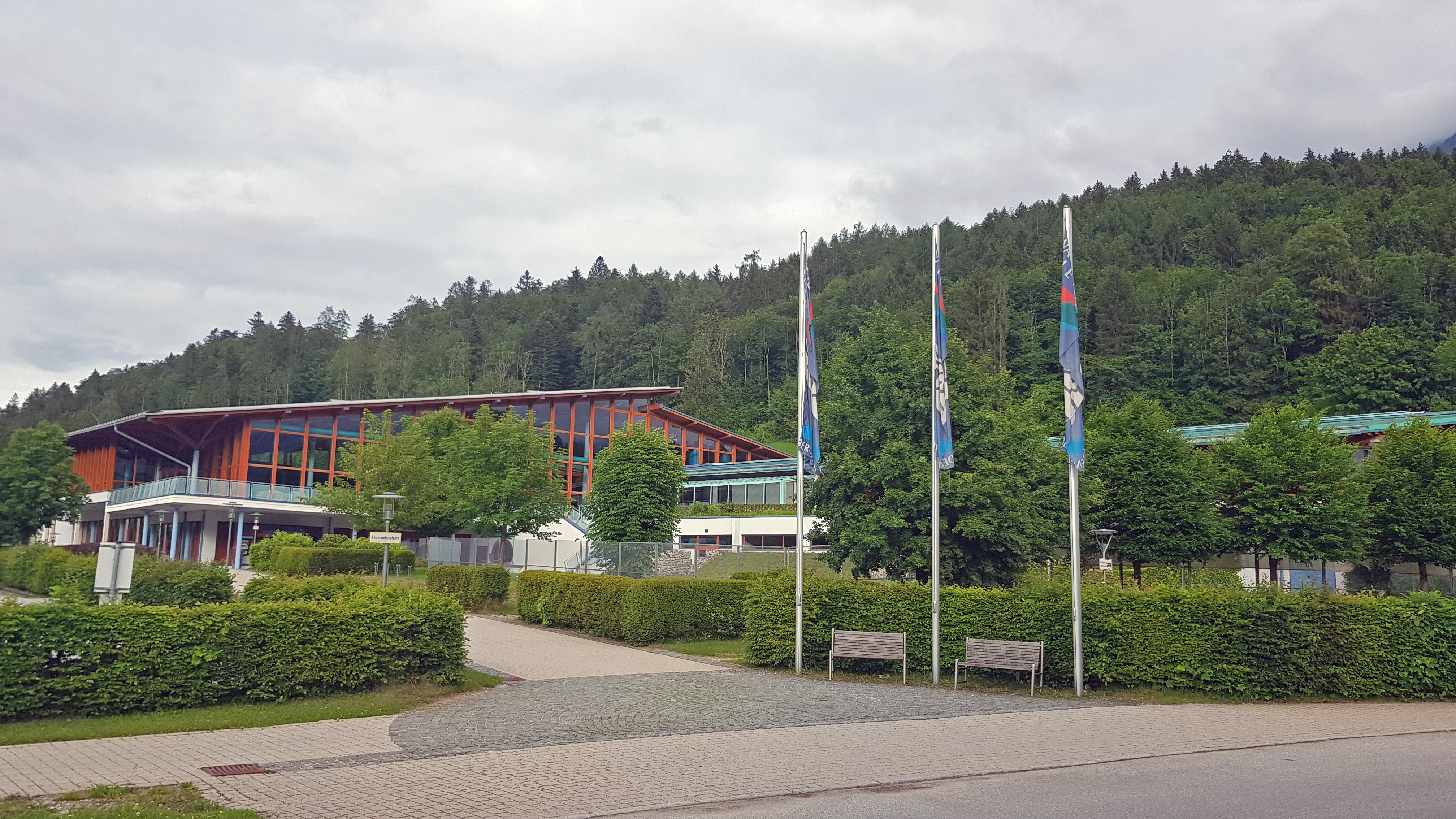 Blick vom Besucher Parkplatz zum Eingang der Watzmann Therme